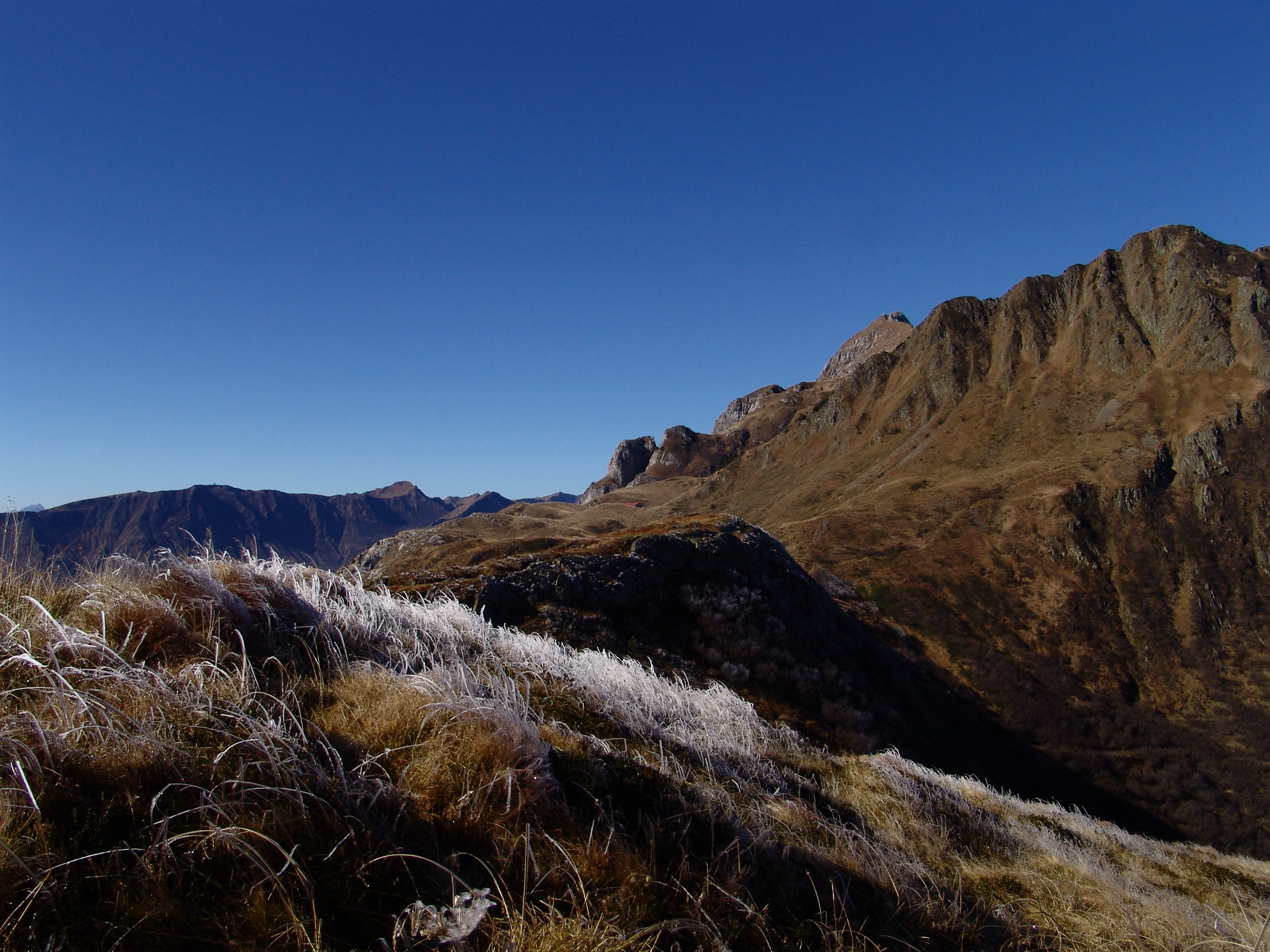 die volle Breite des Törls (besser Sattel) an der Grenze zu Italien erkennt man erst ganz oben